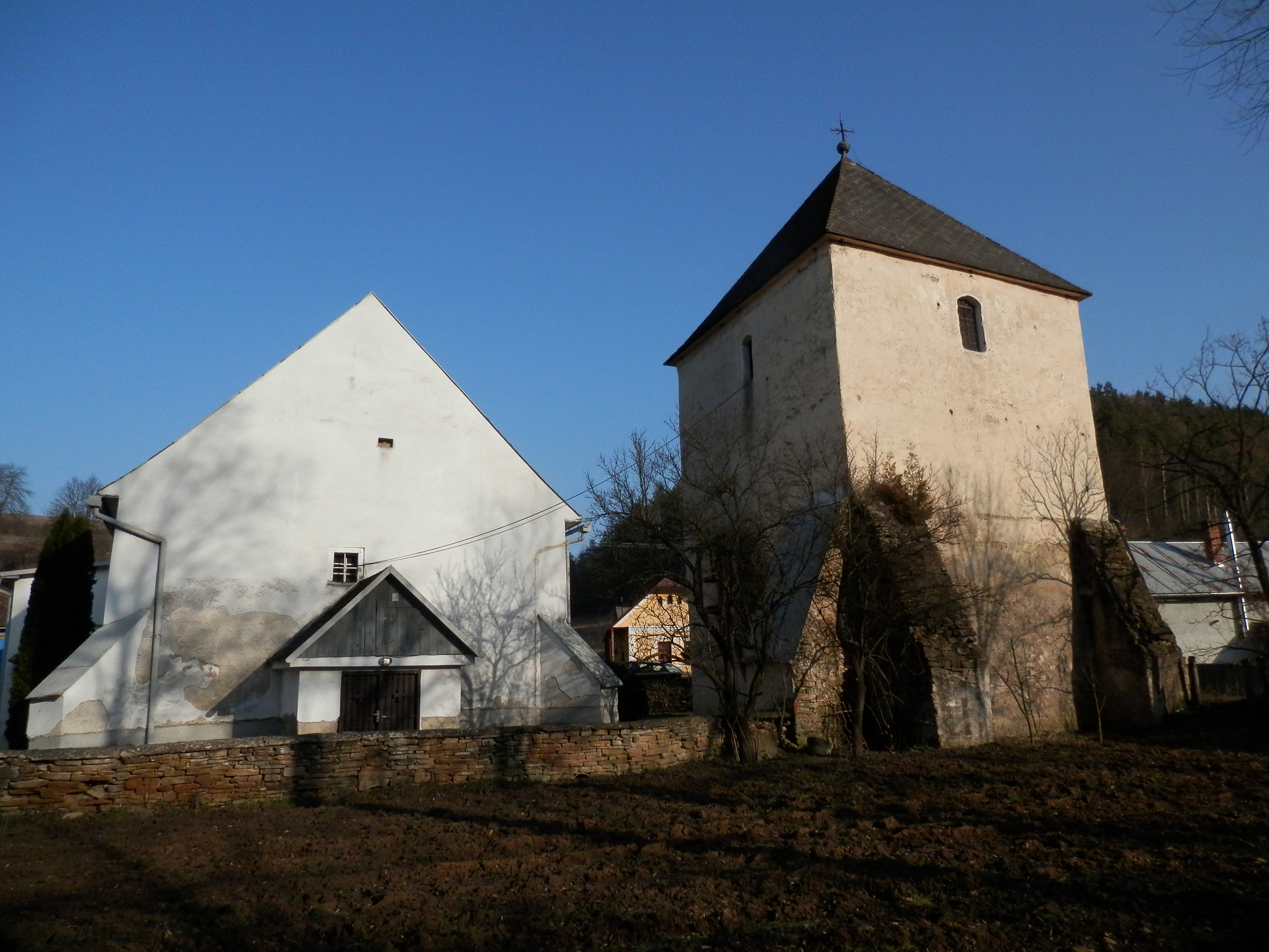 Kostol Povýšenia sv.Kríža. Obec Krížovany, okres Prešov, región Šariš Zvonica pri kostole sv. Kríža. Obec Krížovany, okres Prešov, región Šariš